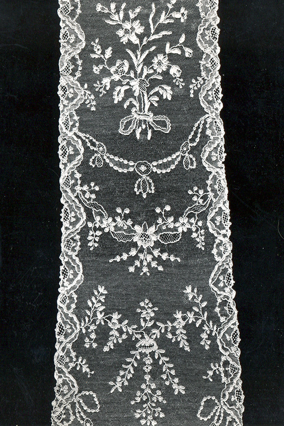 MoMu collection T80/114. Naar de uiteinden toe verbredende strook met bloemenguirlandes afgewisseld met hangende linten met kwasten.Go to and type in the MoMu collection number to find more information about the object.